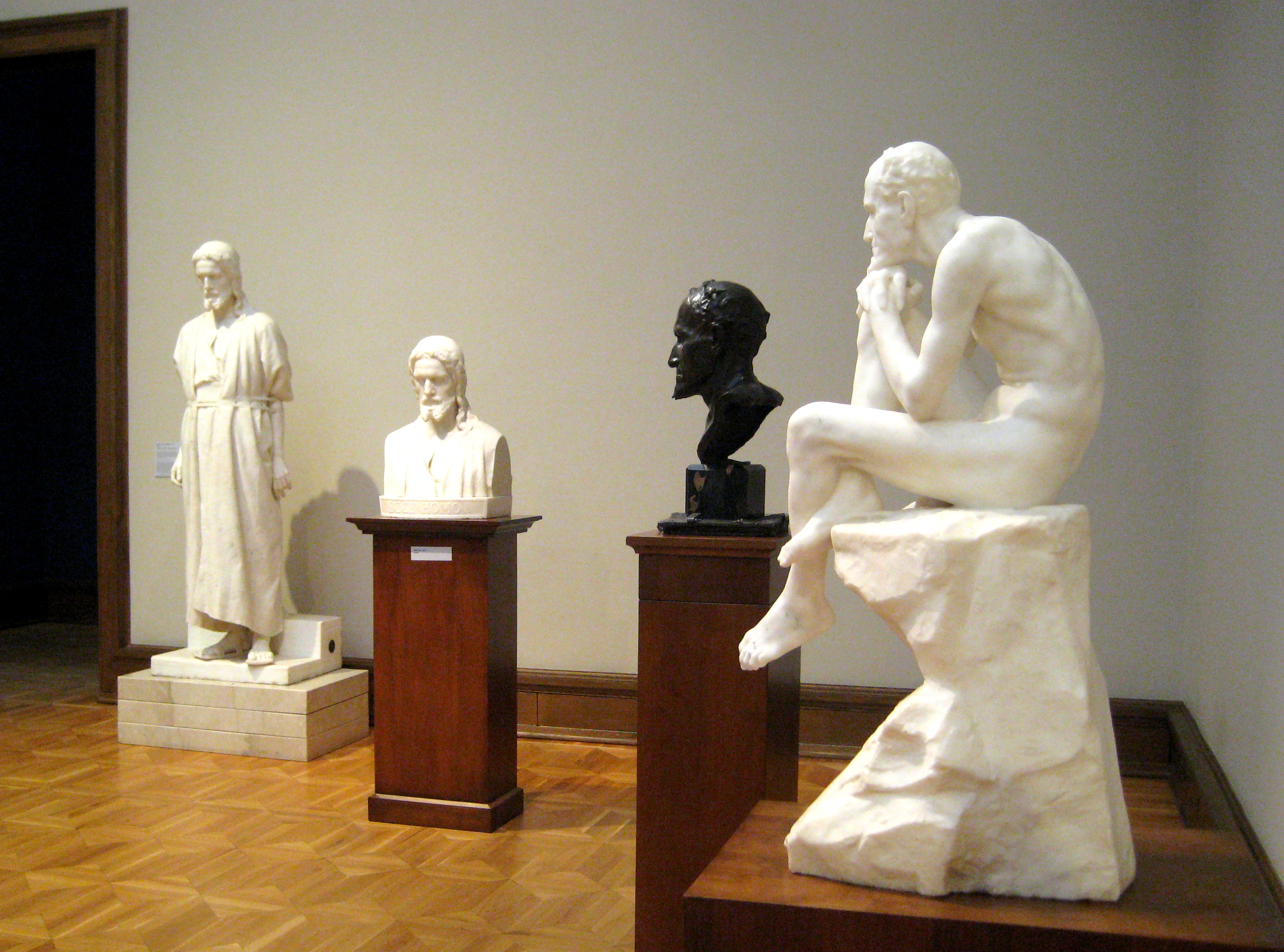 Выставка М. Антокольского в ГТГ